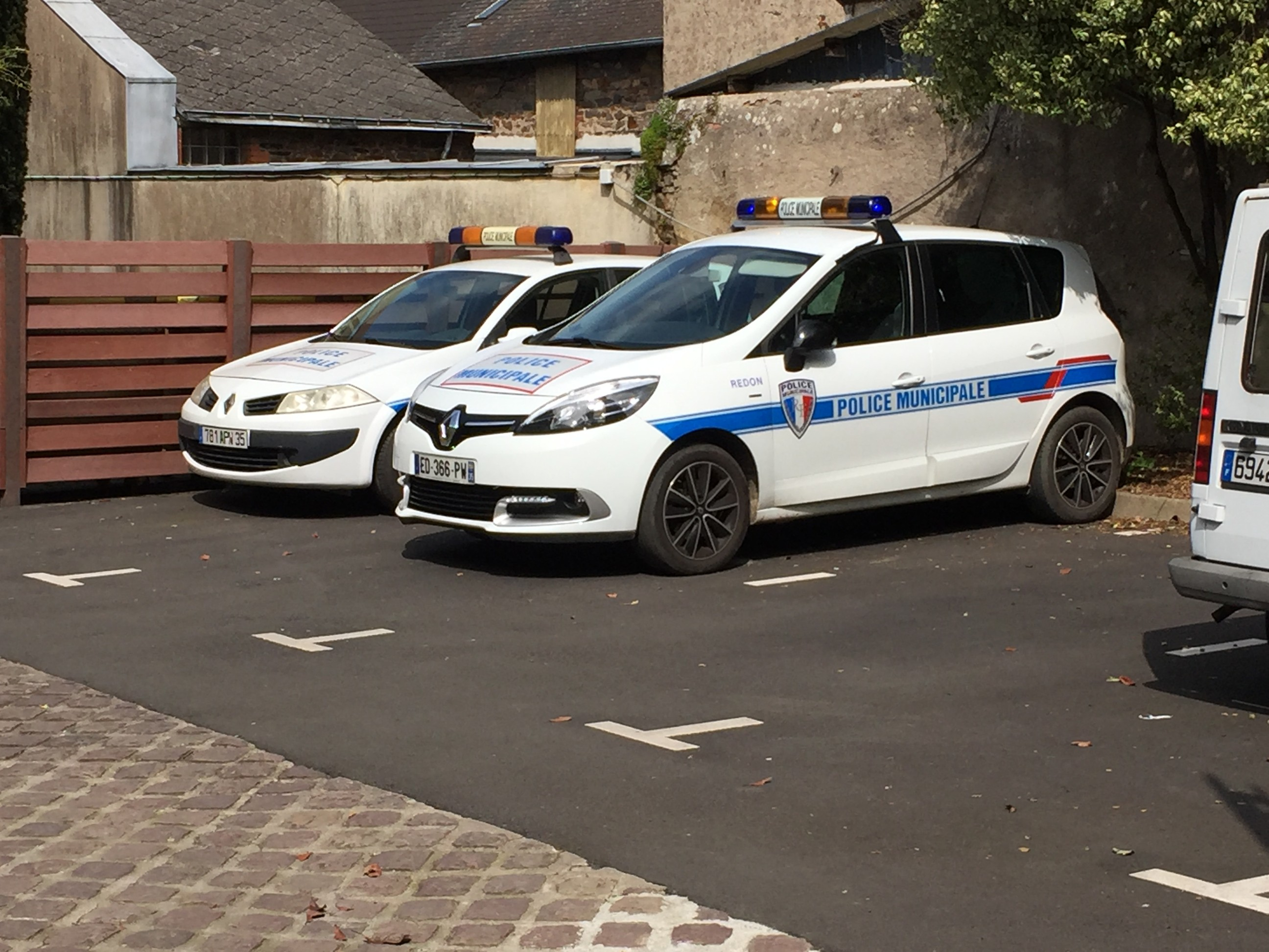 2 Voitures de Police Municipale de Redon